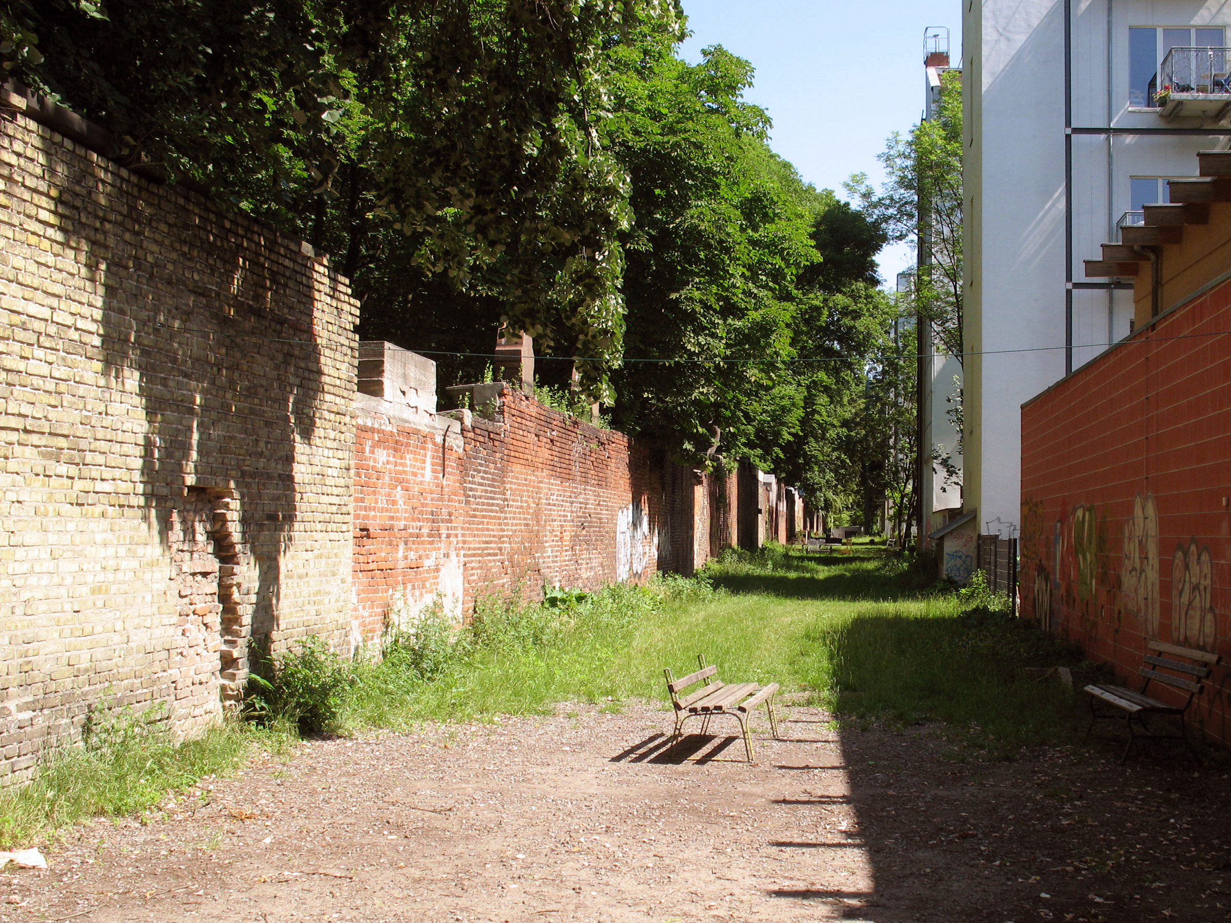 Judengang beim Alten Jüdischen Friedhof, Berlin-Prenzlauer Berg: Blick Richtung Knaackstraße